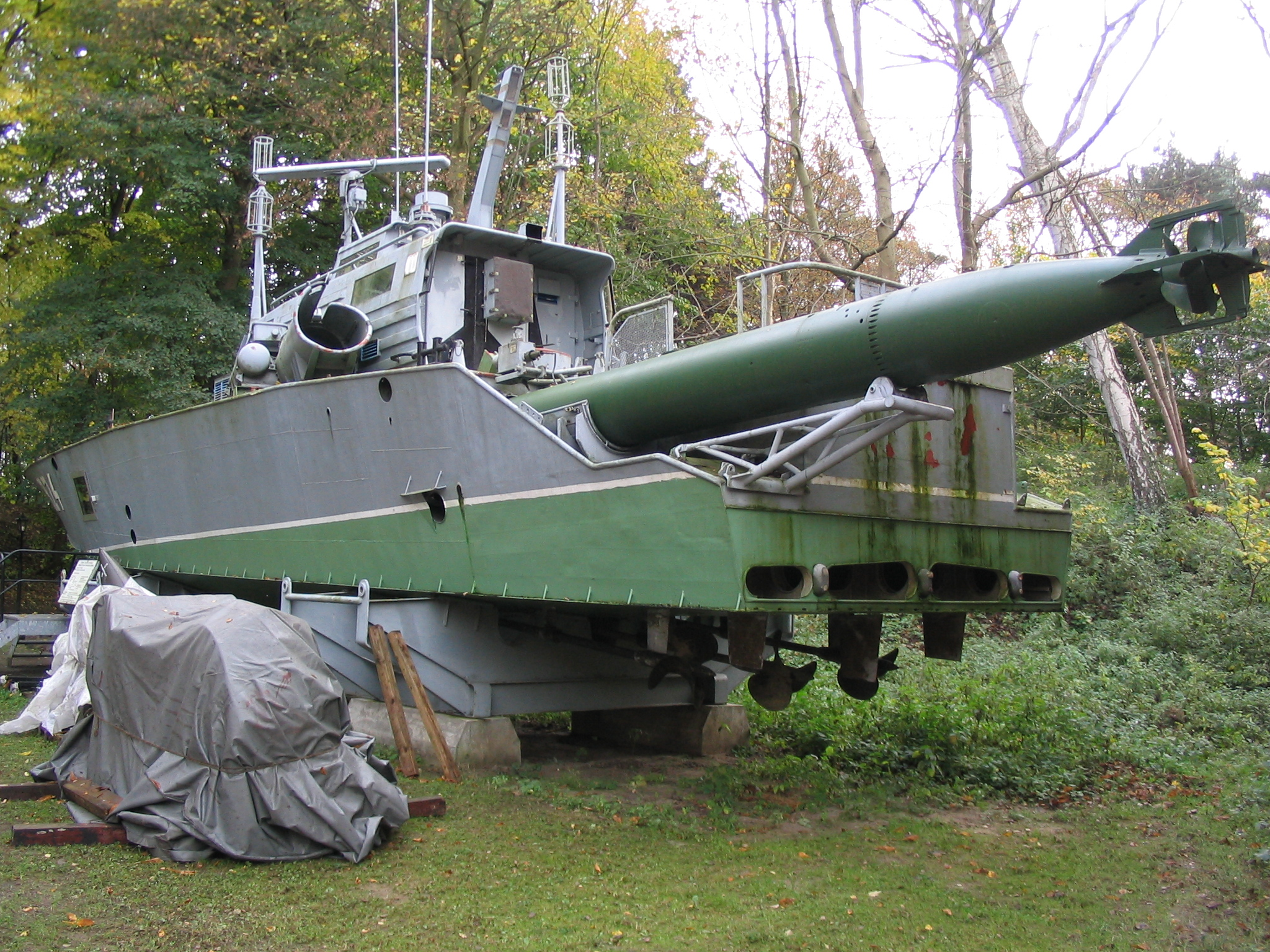 Kleines Torpedoschnellboot Projekt 131 Typ Libelle der Volksmarine im Marinemuseum Dänholm.